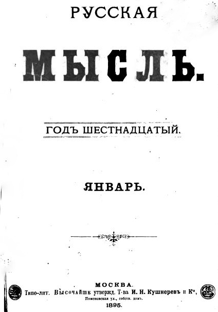 Обложка журнала "Русская мысль" (1895, № 1)